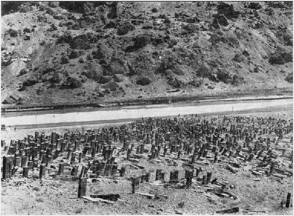 Ջուղայի խաչքարերը Khachkars of Julfa